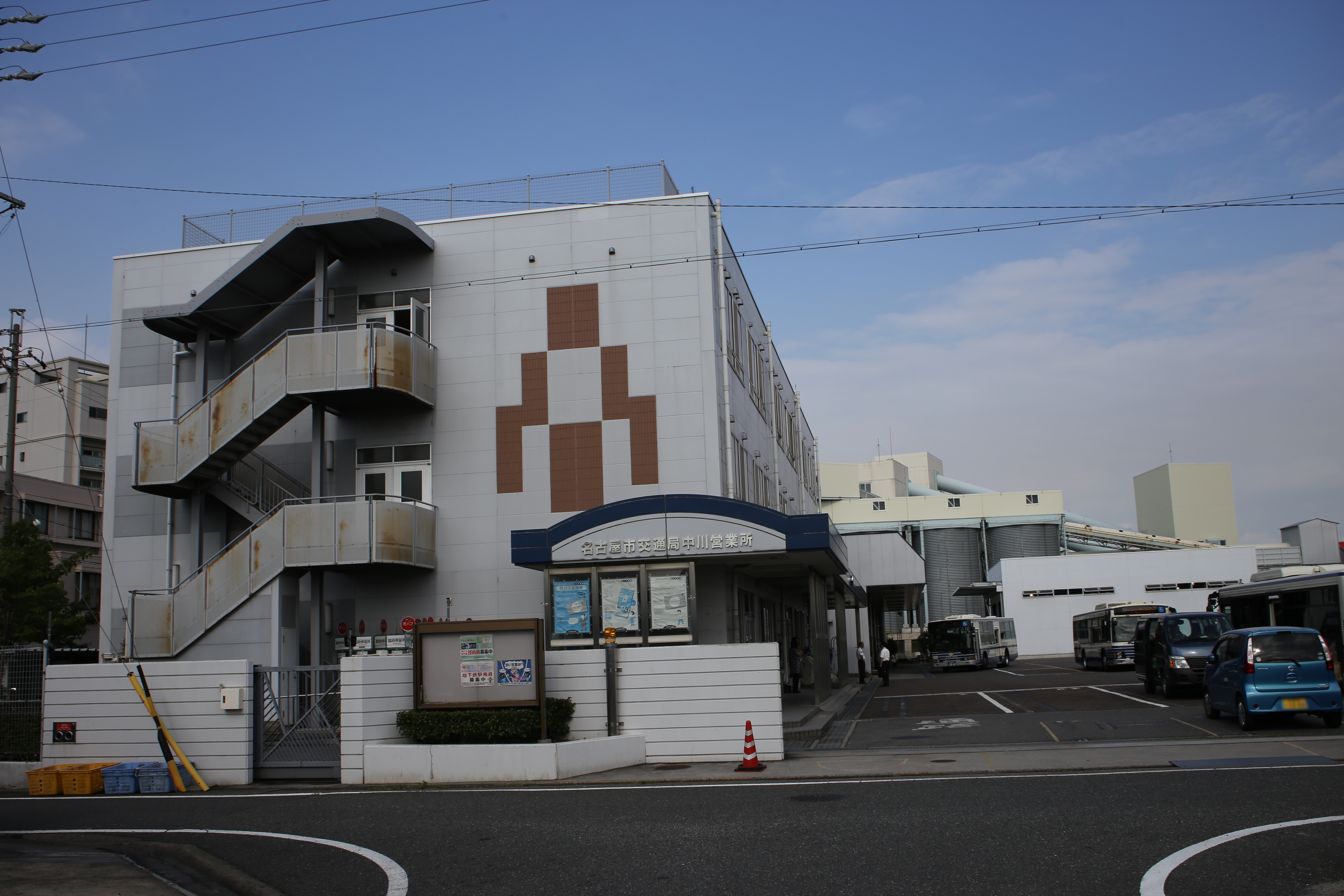 名古屋市中川区法華2丁目の名古屋市交通局中川営業所を西側公道より撮影